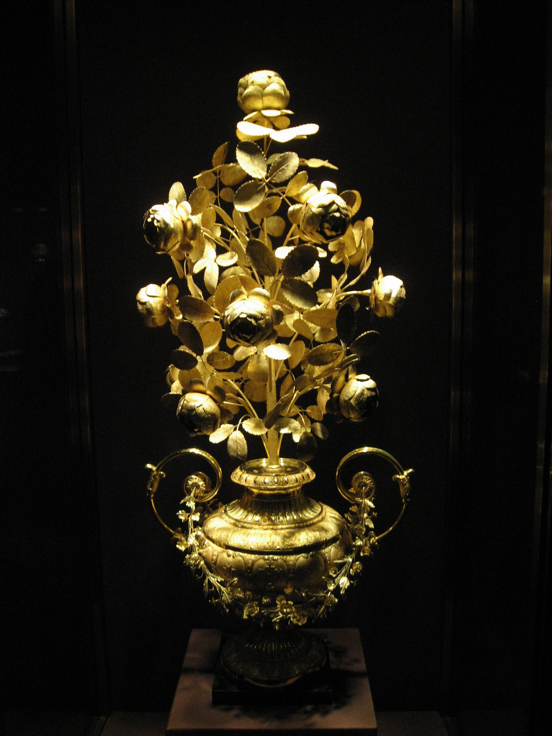 Goldene Rose. Giuseppe und Pietro Paolo Spagna. Rom, um 1818/19. Gold, verde antico. SK Inv. Nr. XIV 149.